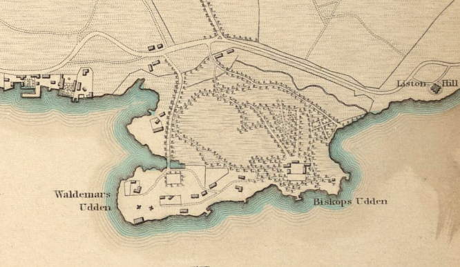 Karta över "Waldemars Udden" 1836